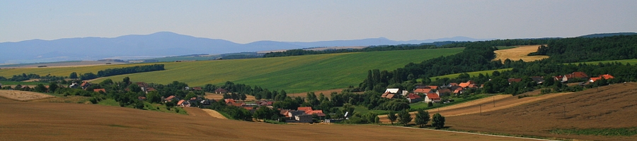 Pohľad na obec Haláčovce